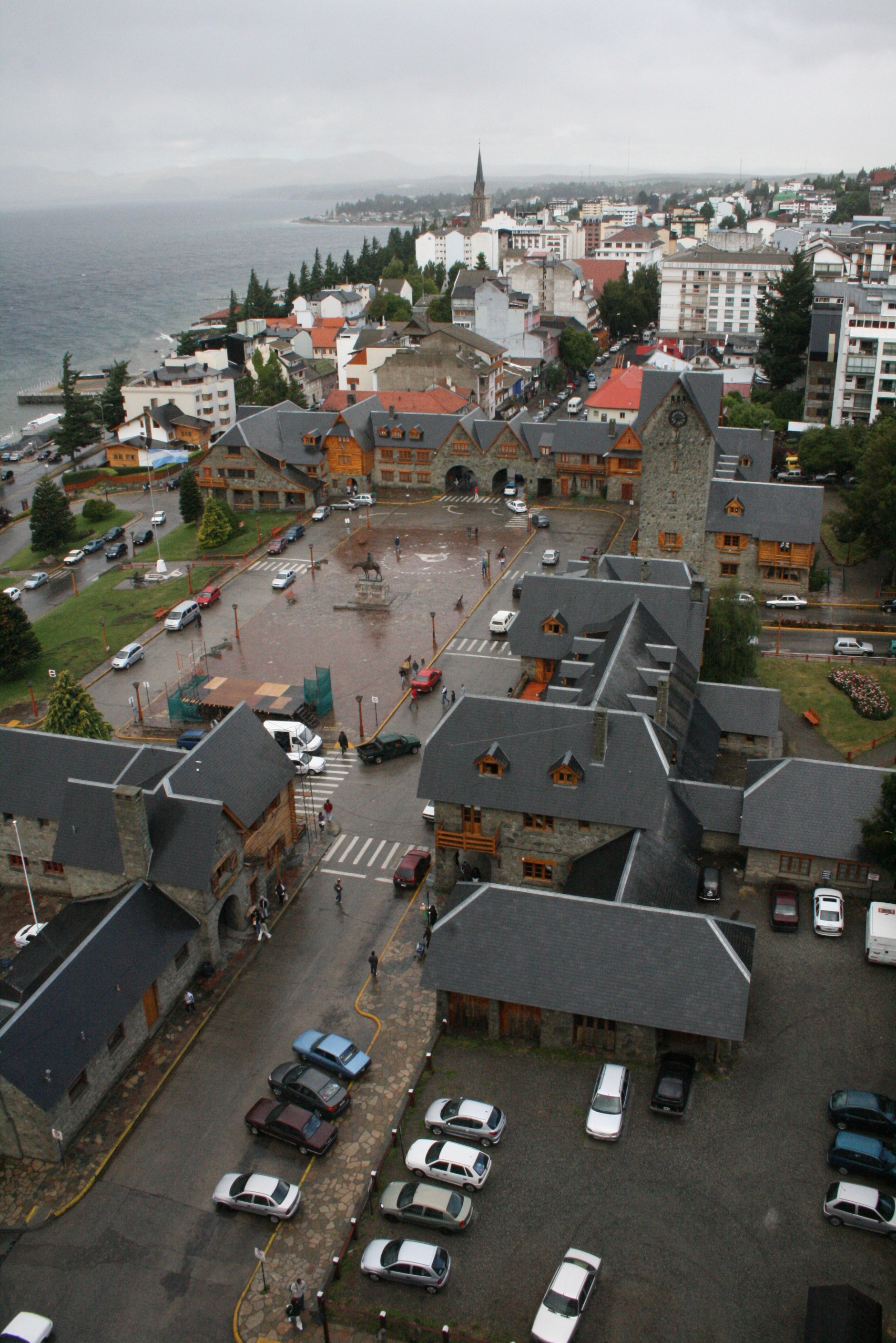 Centro Cívico e Intendencia de Parques Nacionales